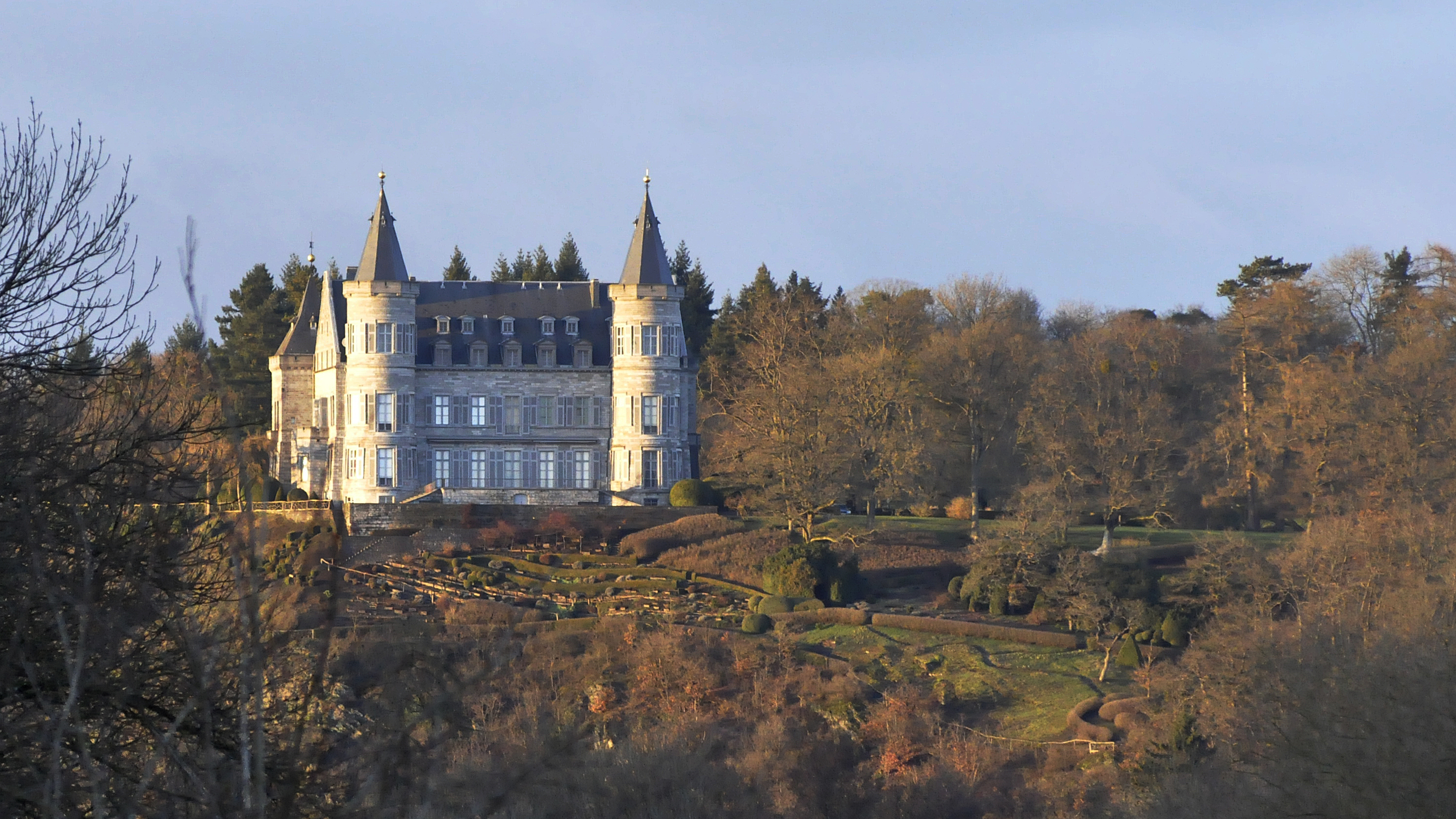 Het Koninklijk kasteel van Ciergnon, Ciergnon, België